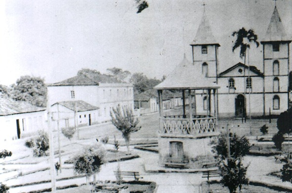 Igreja Matriz do Divino Pai Eterno, construída em 1912, pelo Pe. Antão Jorge. Esta foto é de 1920, na ocasião da emancipação do Povoado de Barro Preto, se transformando na cidade de nome Trindade.